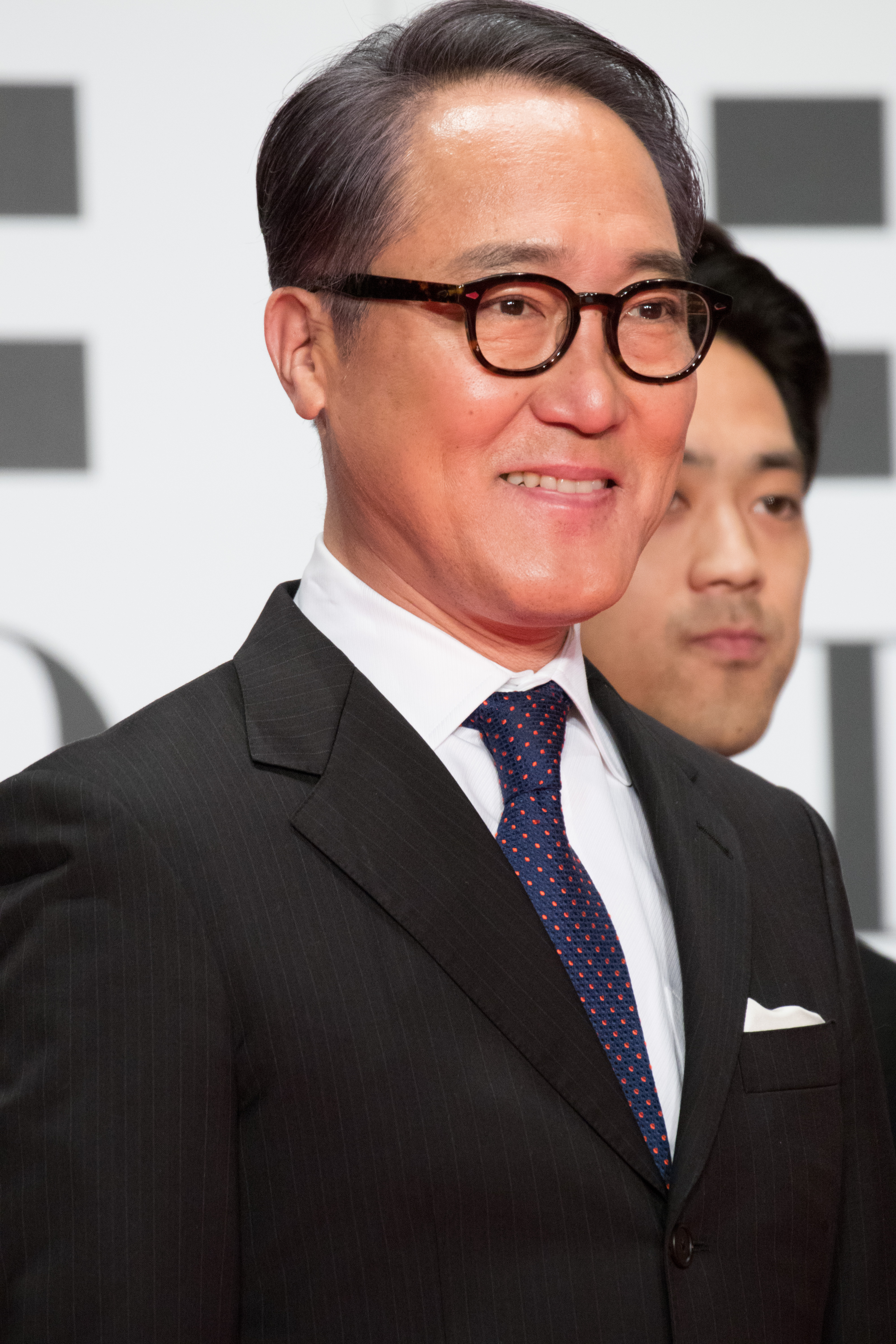 第29回 東京国際映画祭 オープニングセレモニー 佐野史郎 (雪女)